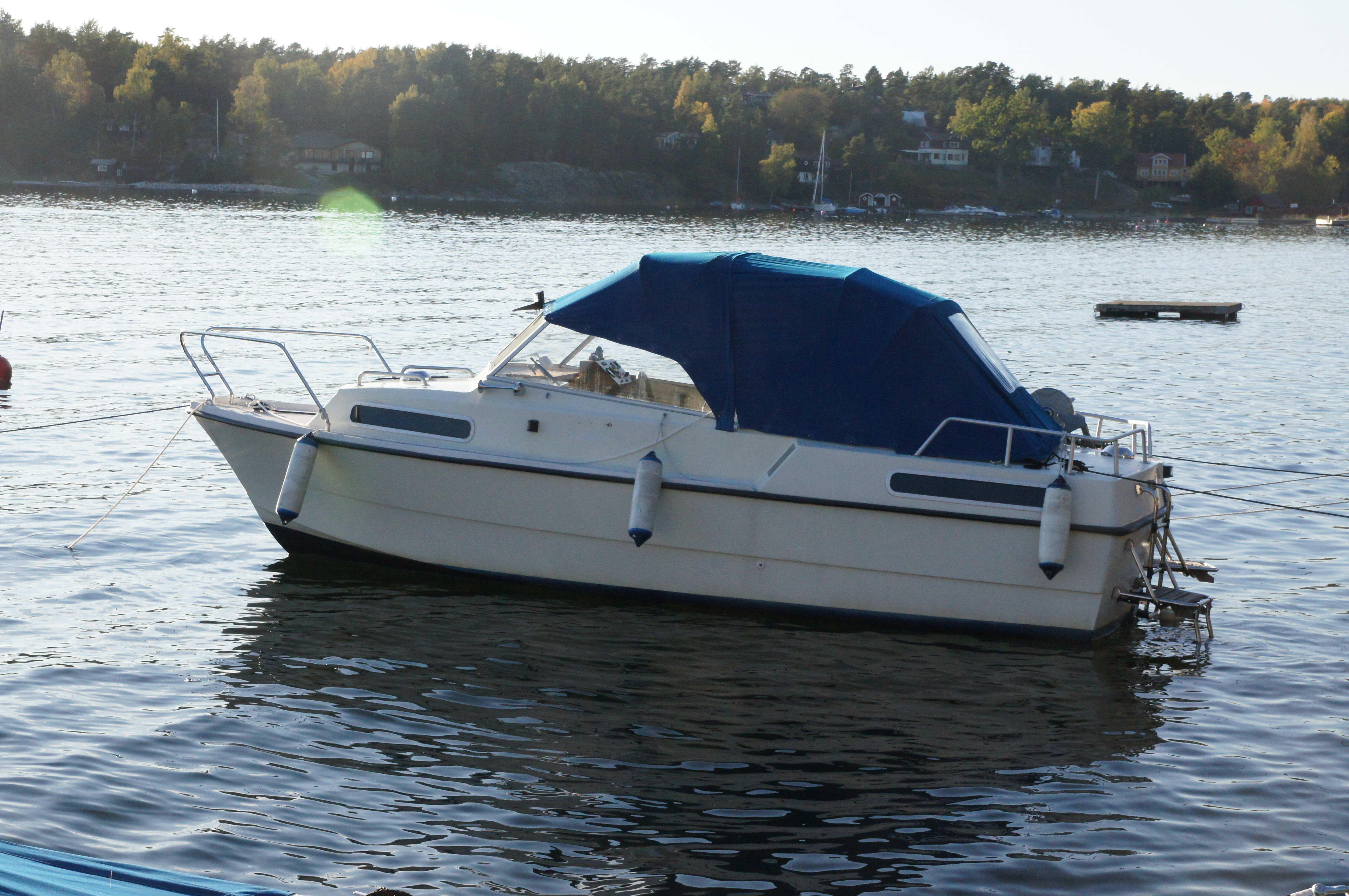 Folkparca med uppfällt kapell